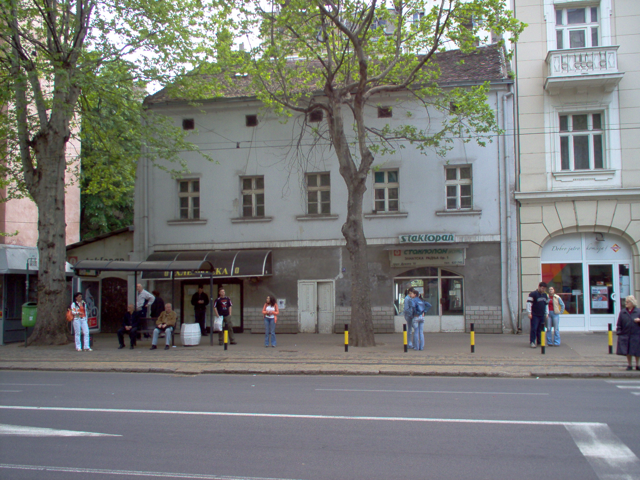 The oldest house in Belgrade, Serbia/La plus ancienne maison de Belgrade, dans le quartier de (Serbie)